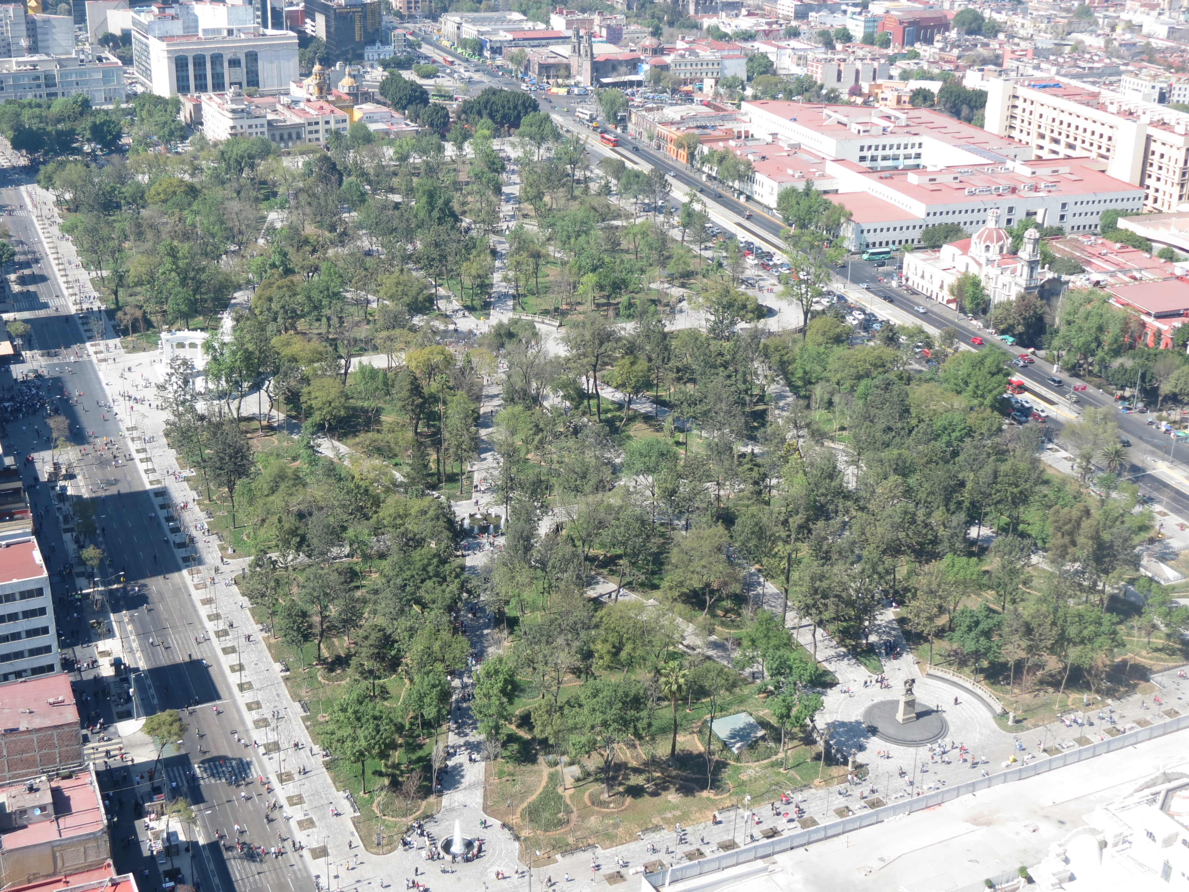 Vista de la Alameda Central desde la Torre Latinoamericana